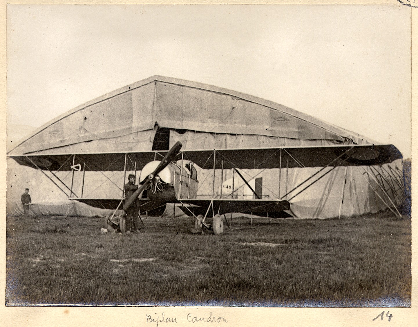 Adjudant Bauer réparant un avion biplan Caudron dans un champ d'aviation près d'Amiens (Somme). 13 juin 1915. Guerre 1914-1918.